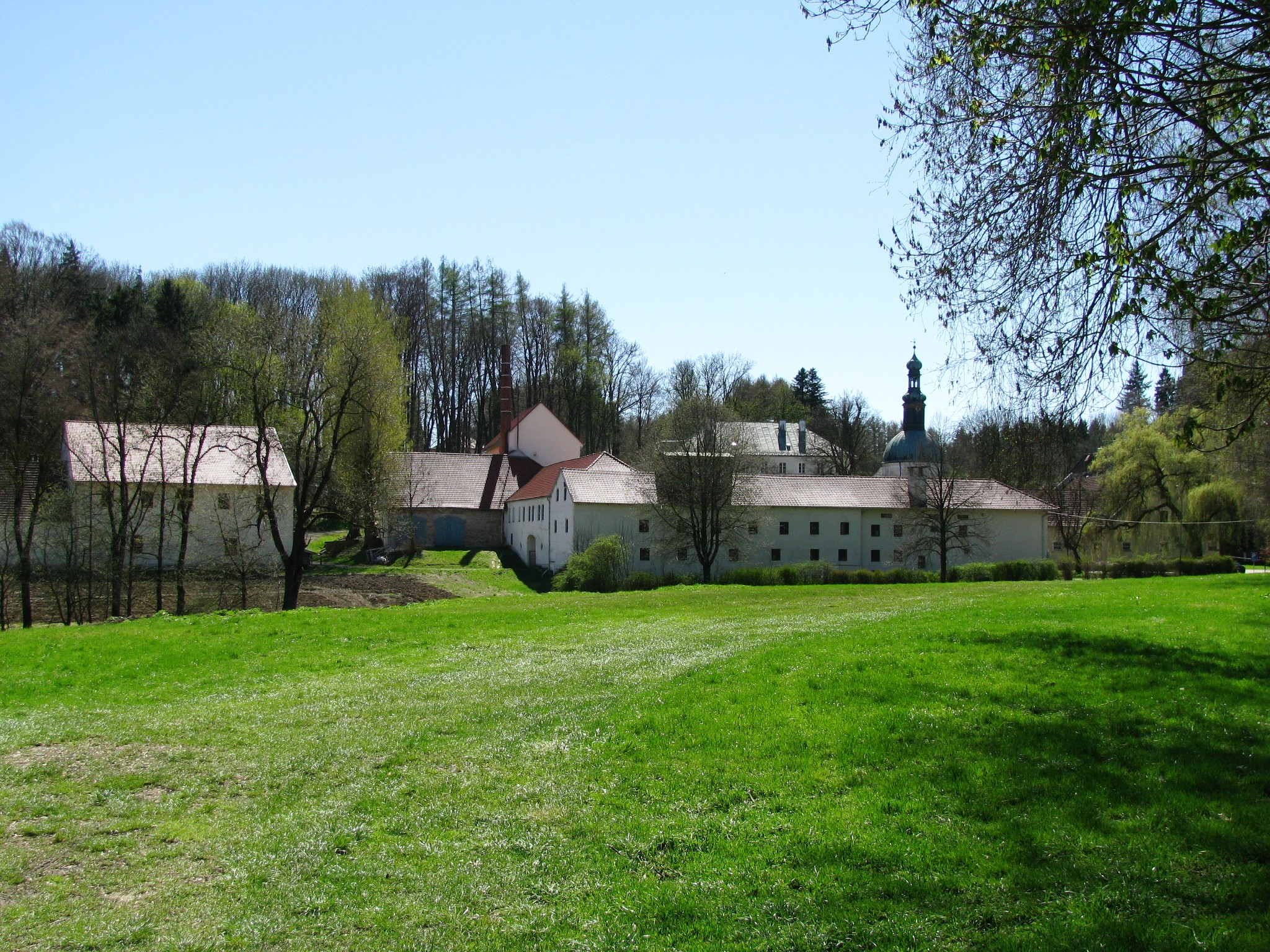 Mariabrunn im Landkreis Dachau